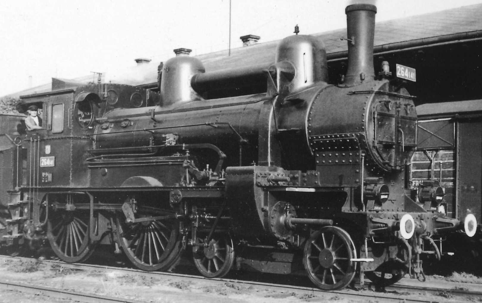 kkStB 106 als CSD 264 141 im Bahnhof Rakovnik